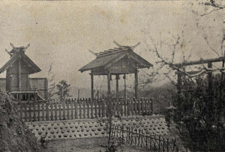 錦水神社位於台灣新竹州造橋庄的錦水礦山，由日本石油株式會社設立